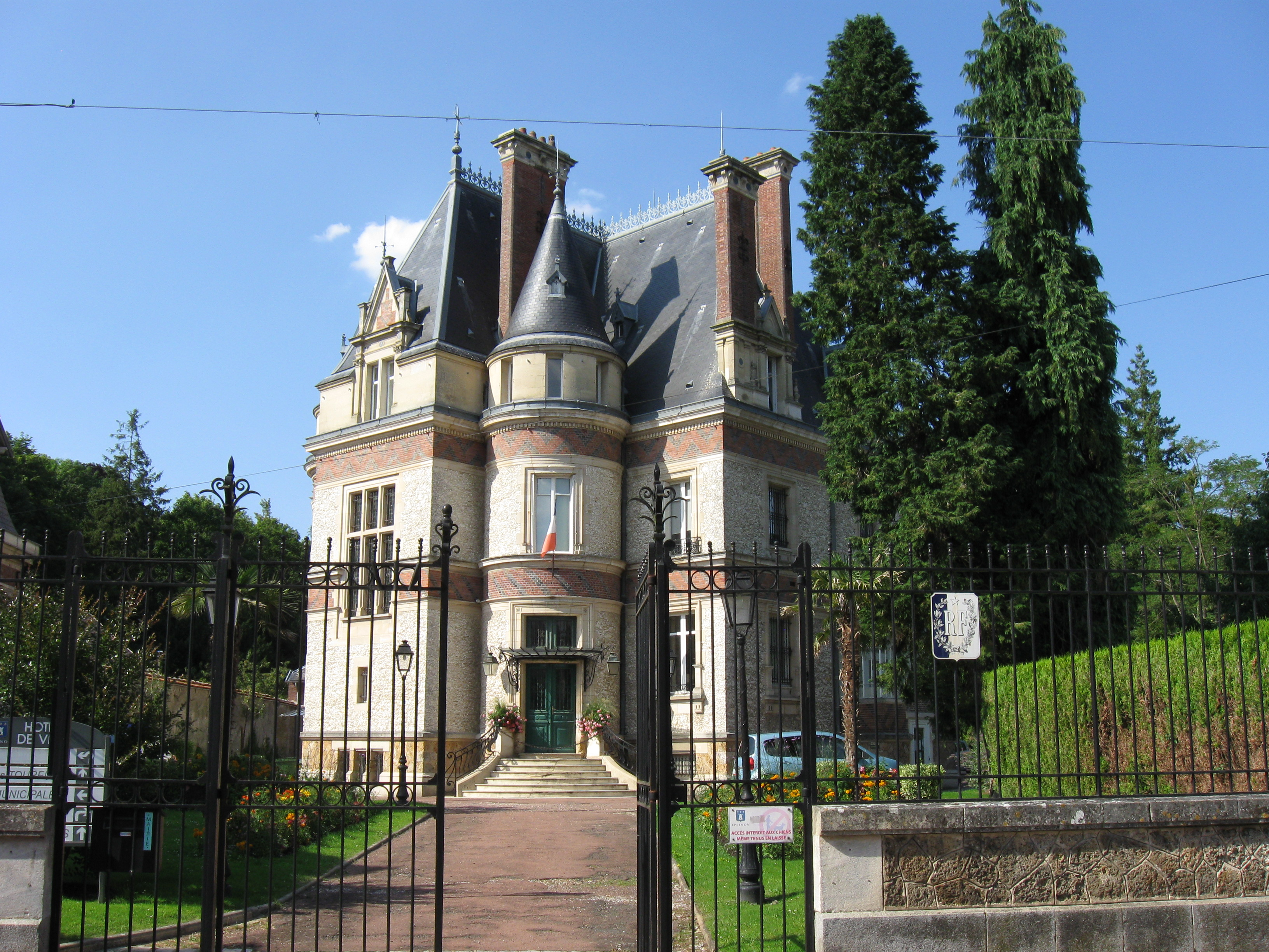 L'hôtel de ville d'Épernon. (Département d'Eure-et-Loir, région Centre).